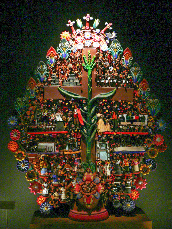 L'Arbre de Vie